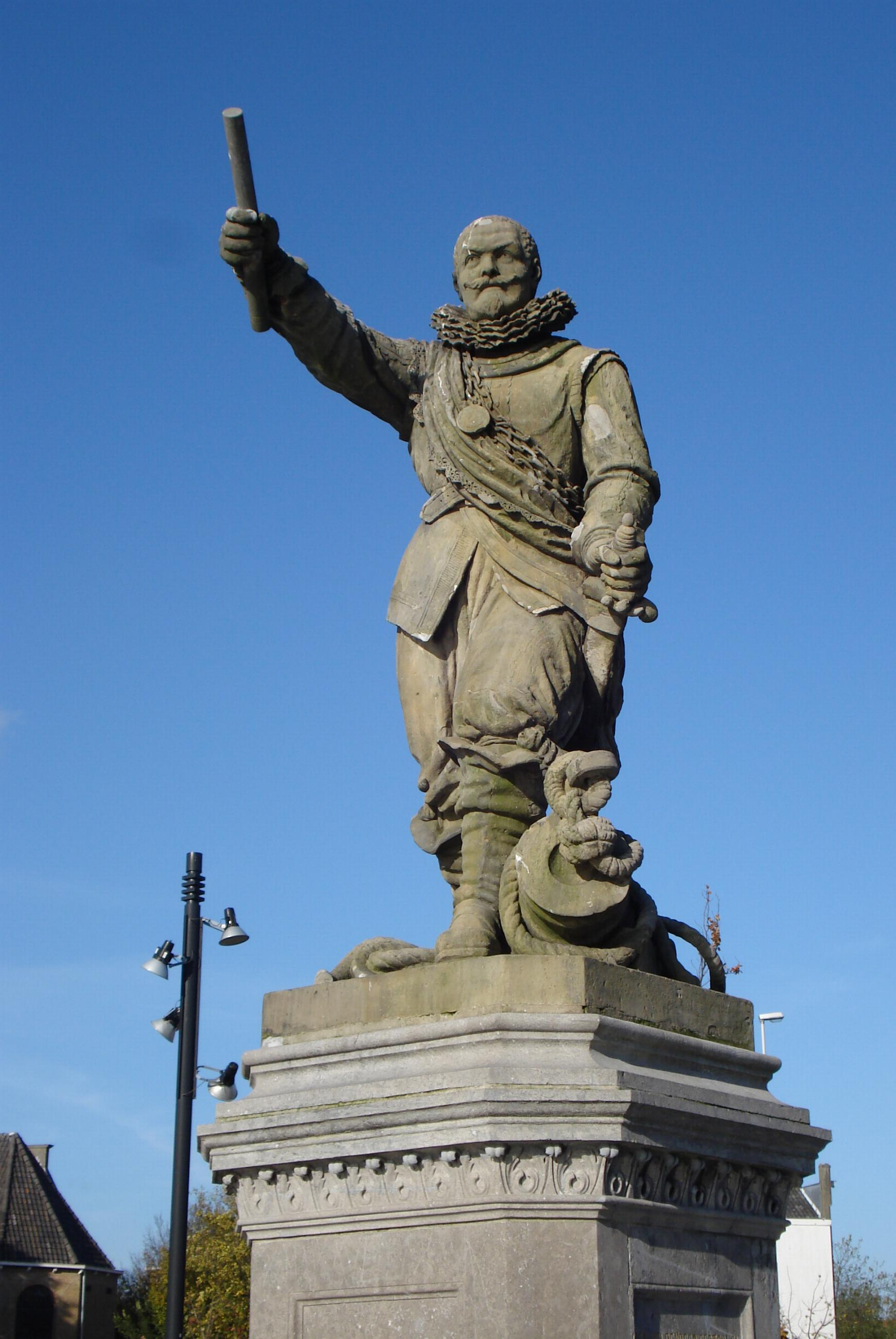 Rotterdam, Piet Heynsplein. Monument Piet Heyn. Rijksmonument.